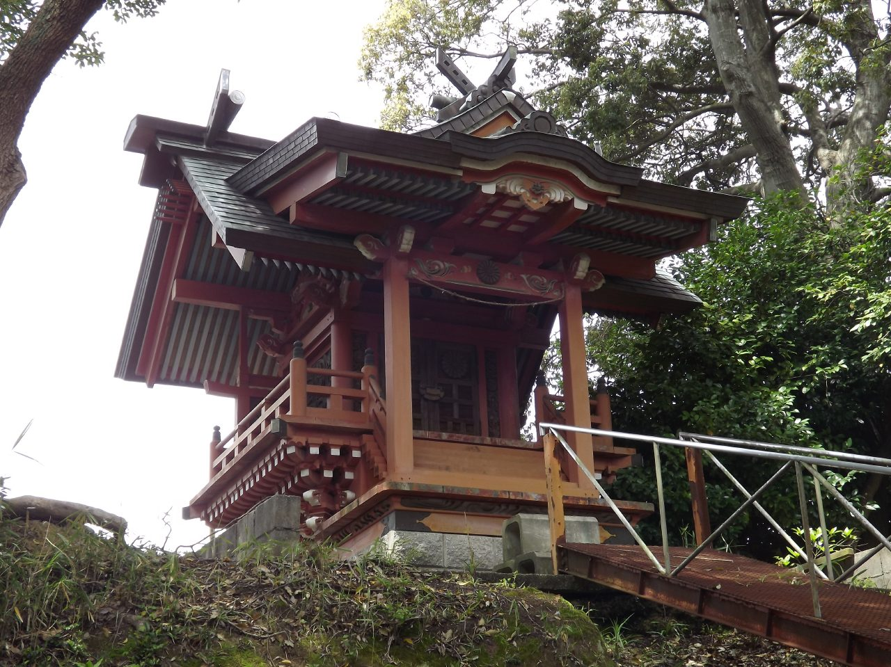 八坂寺 熊野十二社権現